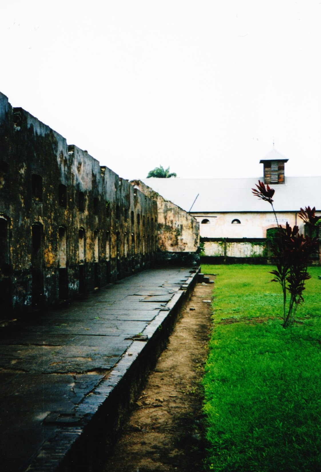 Vue à l'intérieur du bagne de Saint-Laurent-du-Maroni.